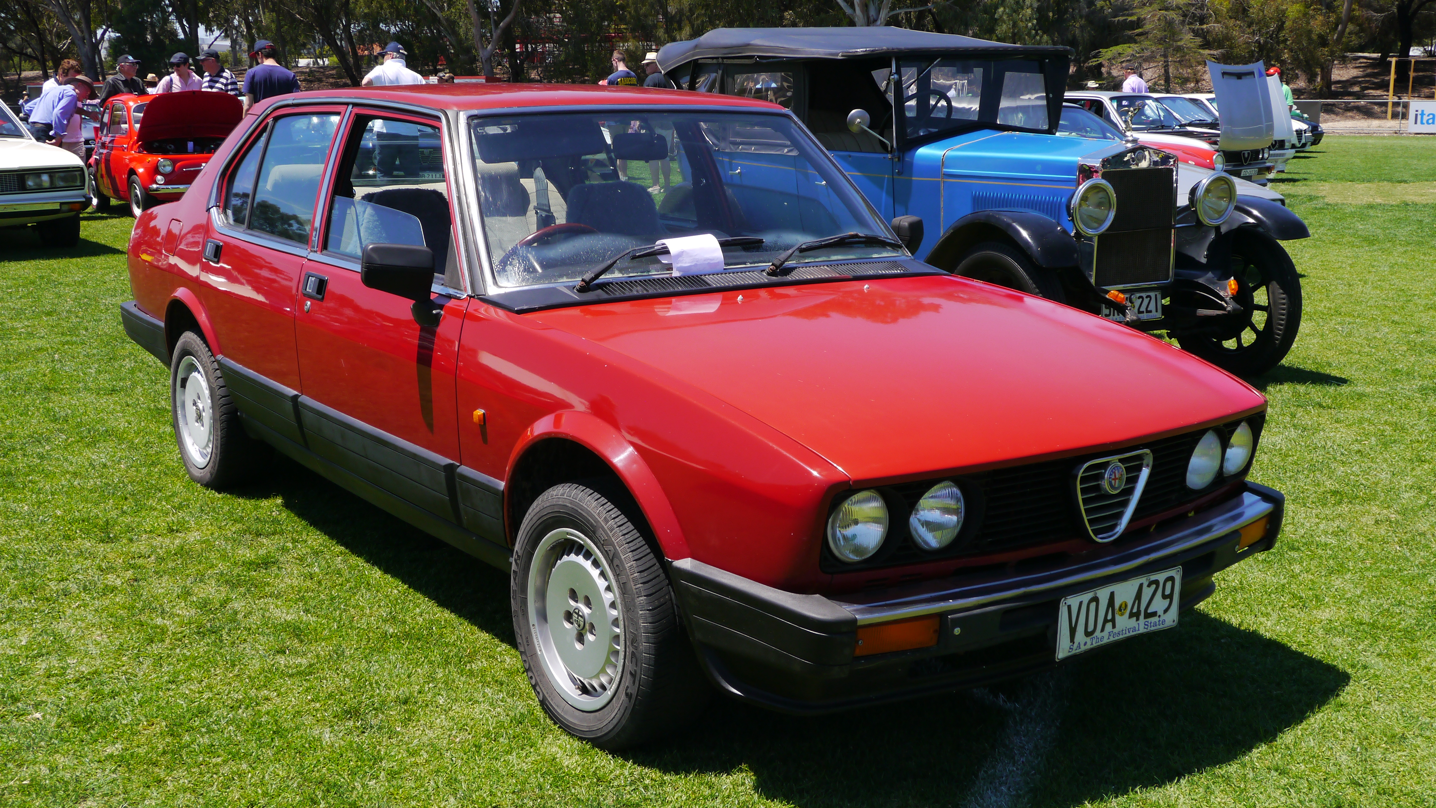 Alfa Romeo Alfetta